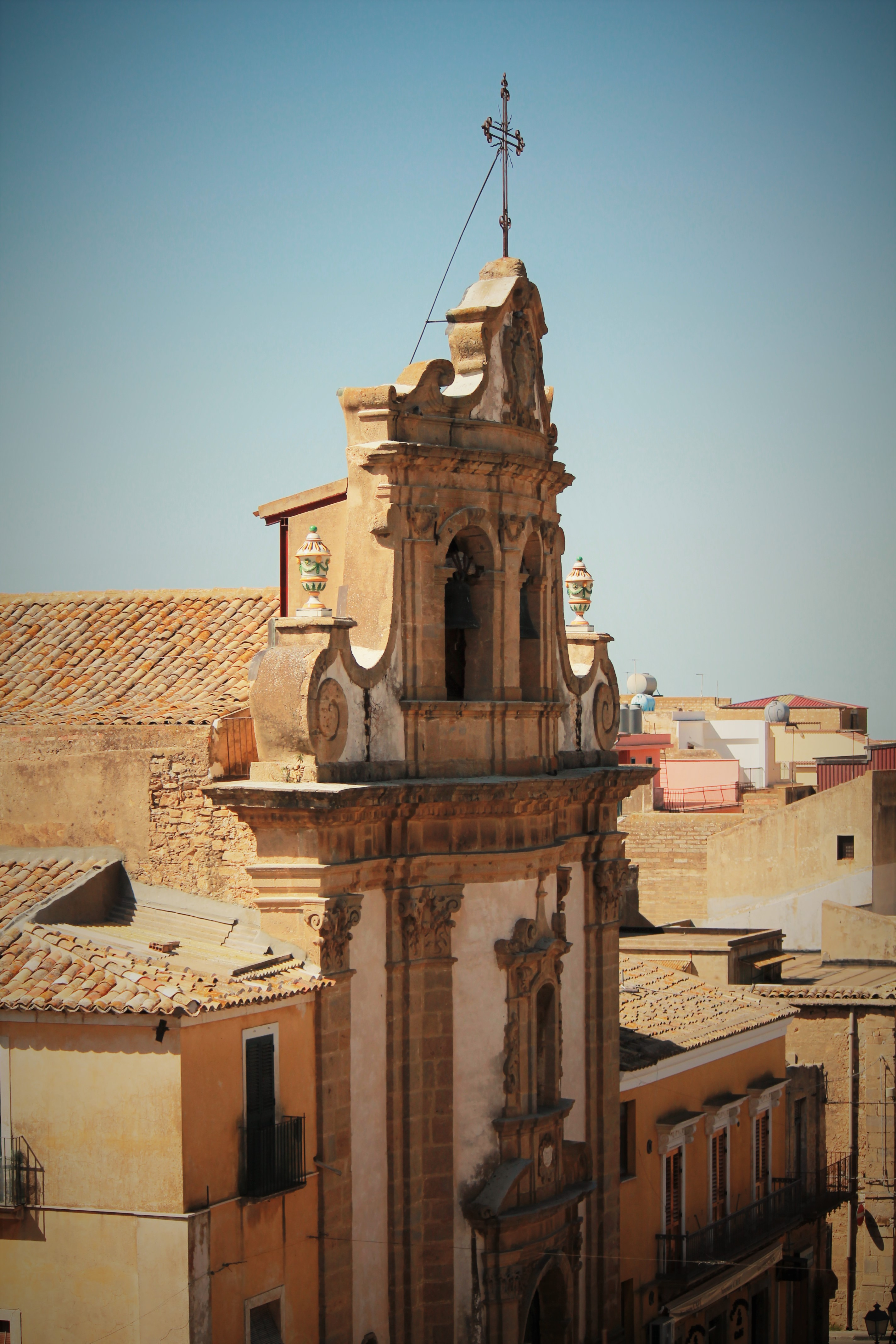 Facciata della Chiesa dell' Addolorata di Niscemi (CL).Cella campanaria con trifore e lesene in stile ionico